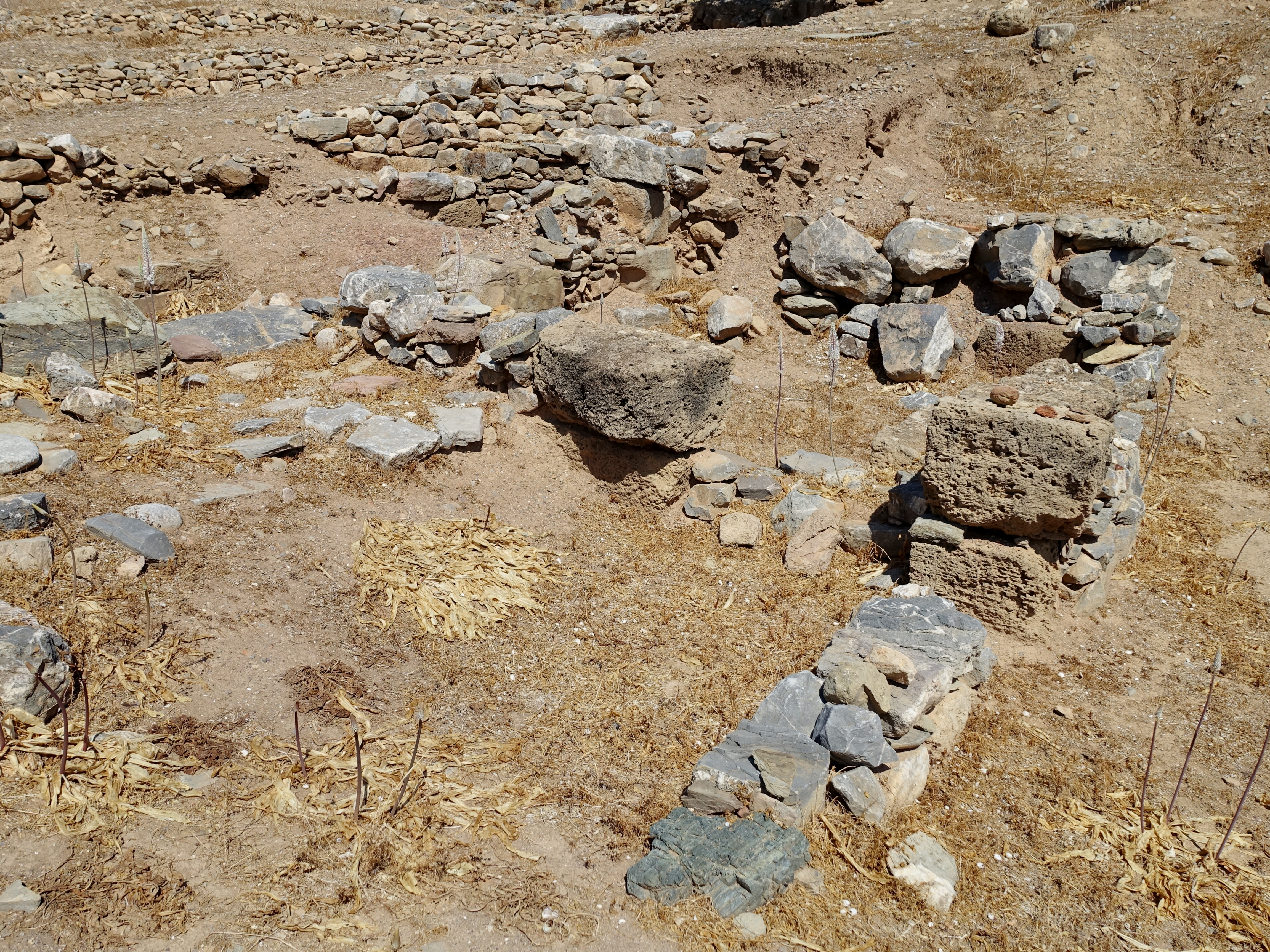 Ausgrabungsstätte auf der Insel Agios Nikolaos (Άγιος Νικόλαος) vor Mochlos (Μόχλος), Kreta, Griechenland